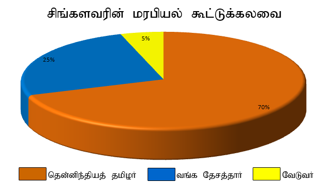 சிங்களவரின் மரபியல் கூட்டுக்கலவை